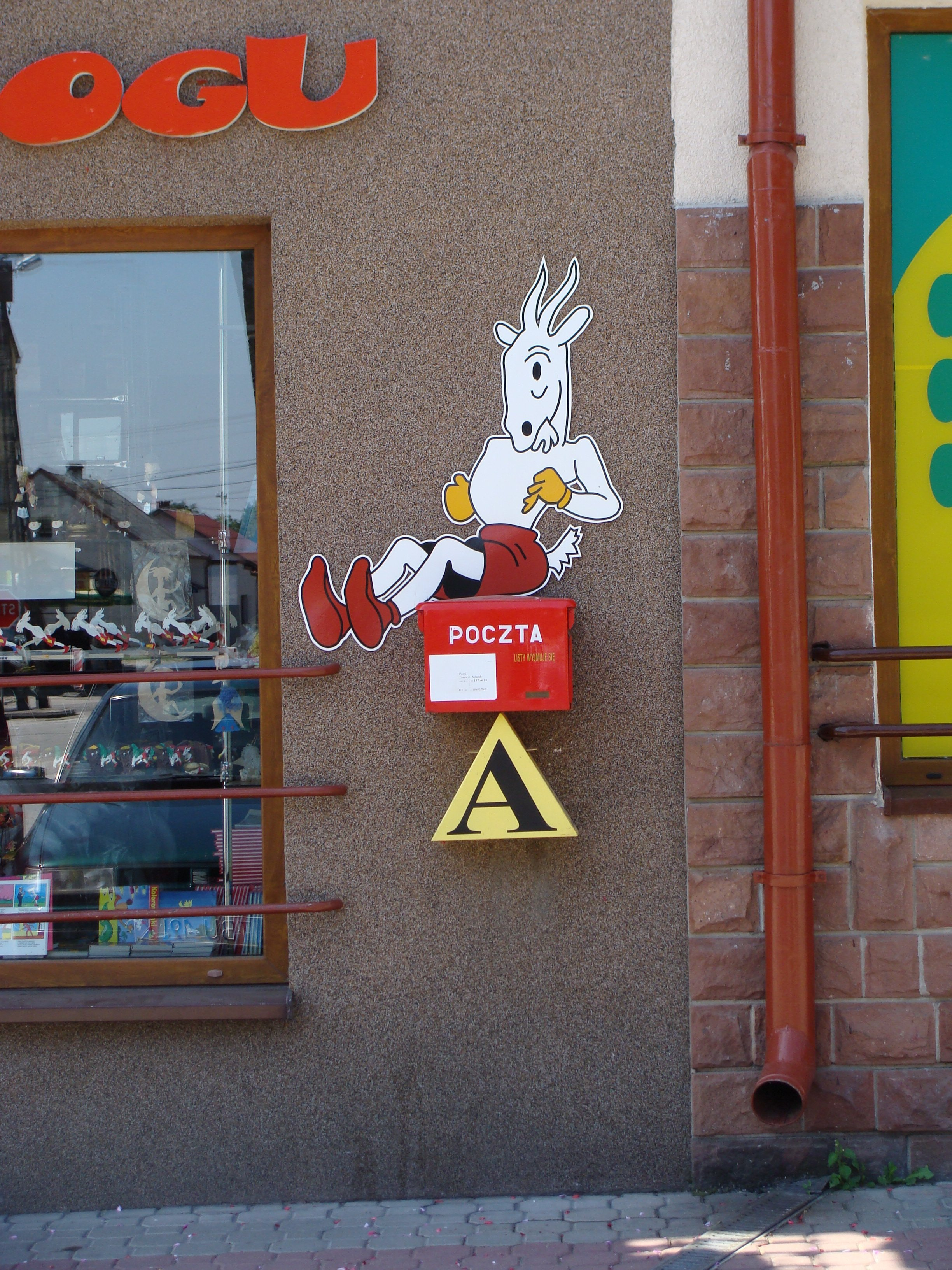 Koziołek Matołek w Pacanowie